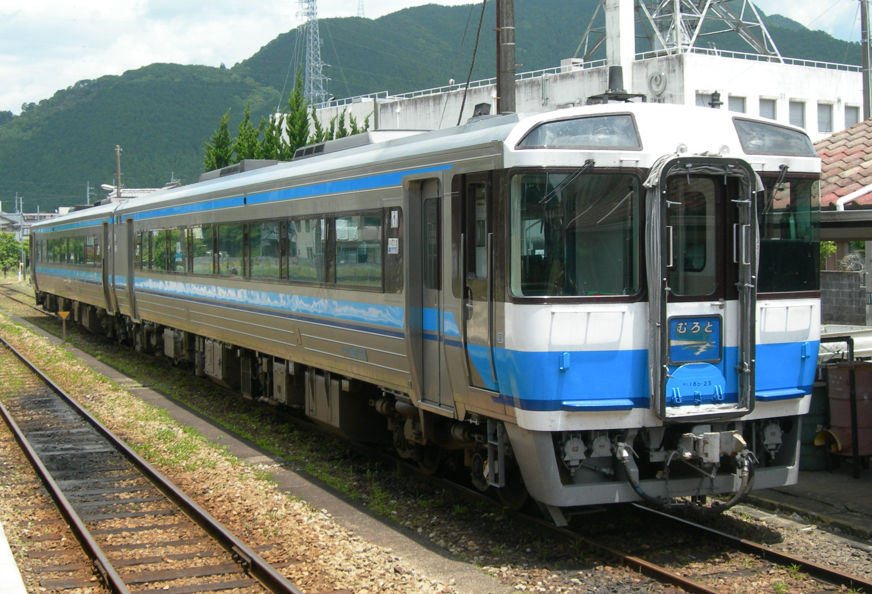 特急むろと